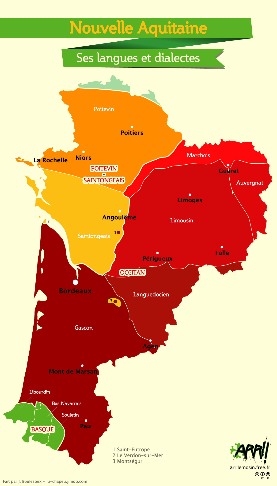 La region Novela Aquitània, sas lingas e sos dialectes.